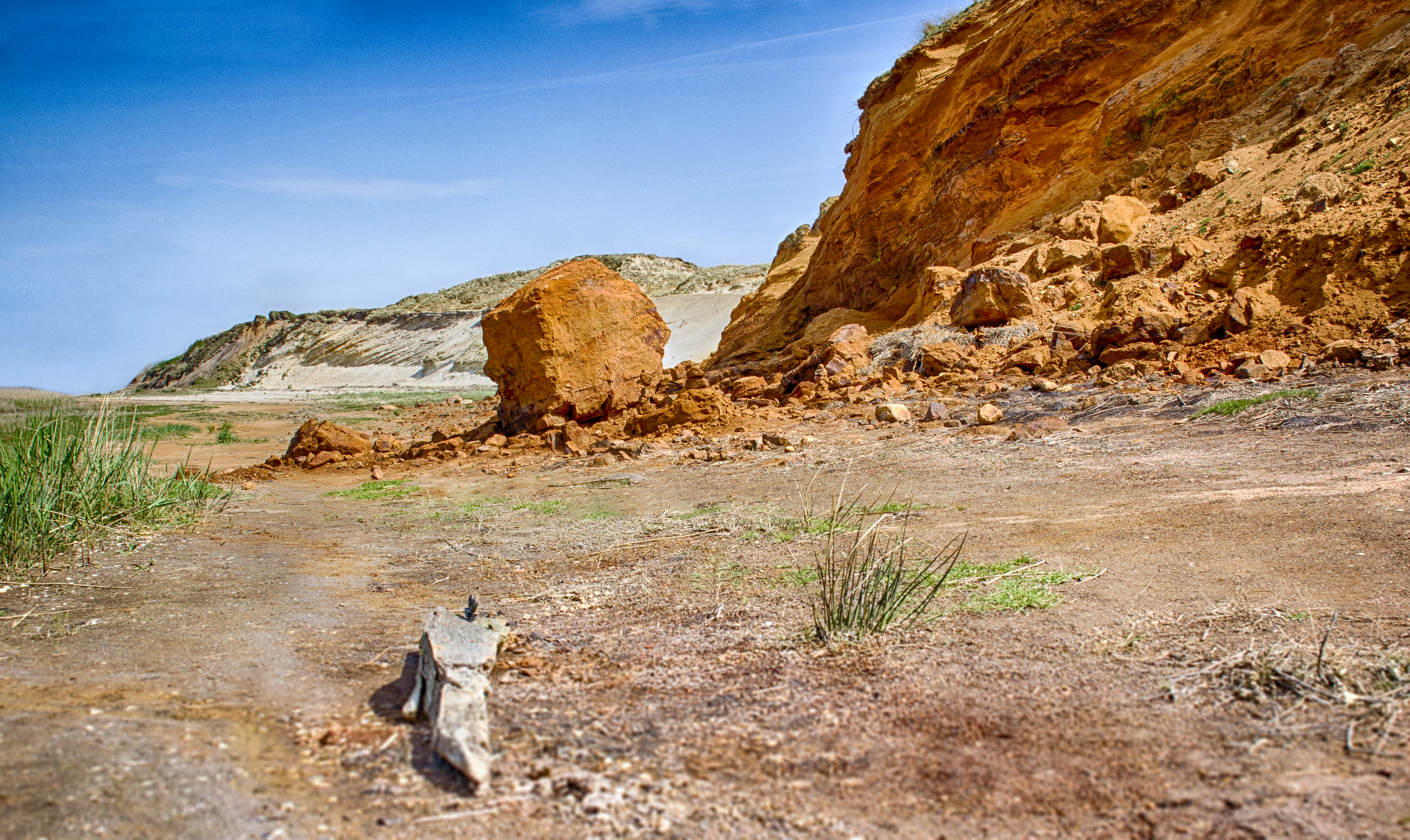 Das Morsum Kliff, 2015.